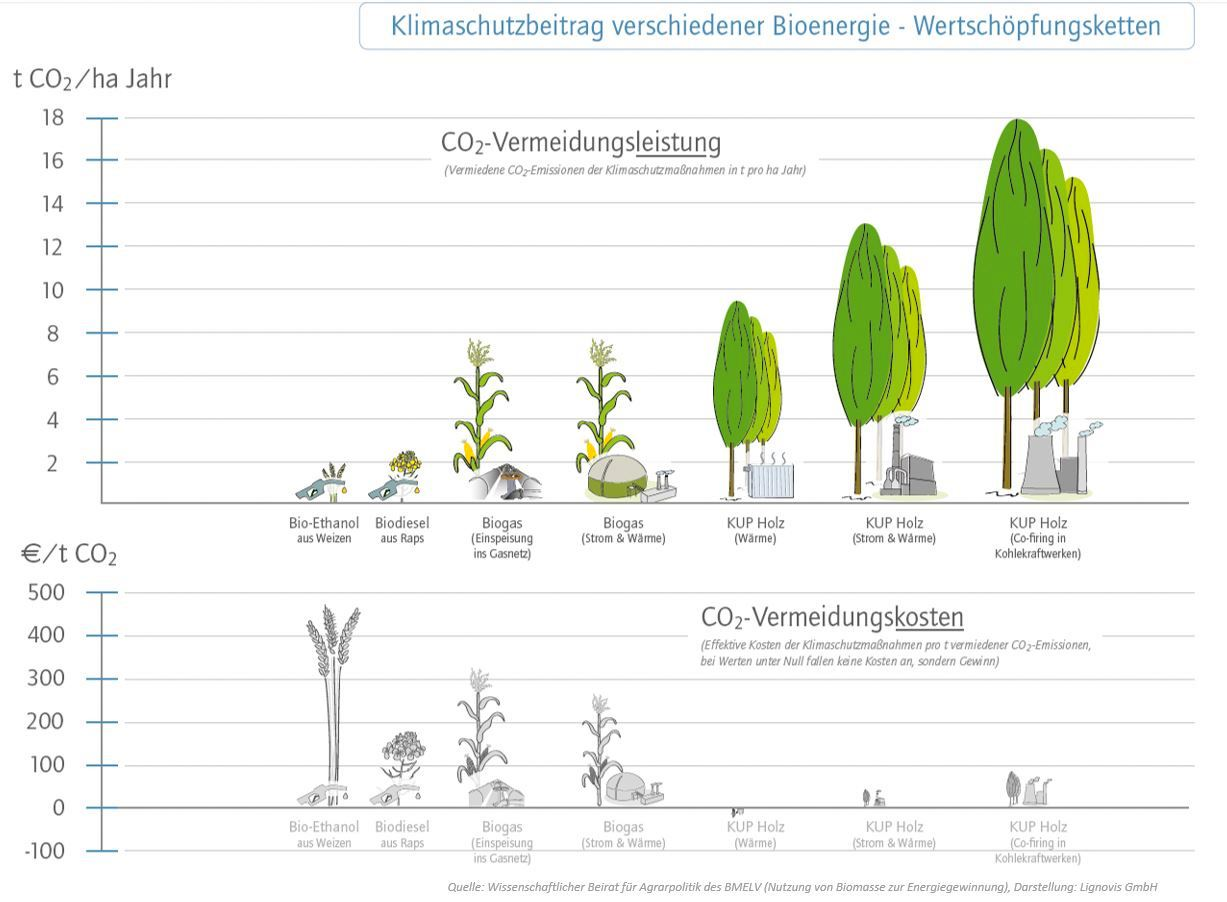 Klimaschutzleistung und CO2-Vermeidungskosten von verschiedenen Bioenergiewertschöpfungsketten - weitere Informationen unter